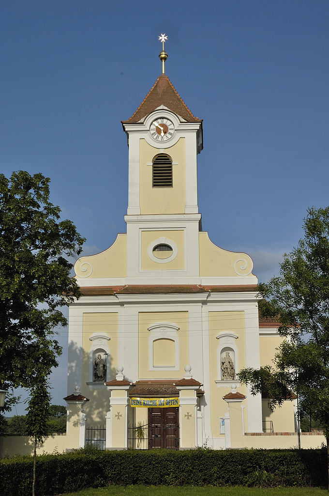 Kath. Pfarrkirche hl. Helena und ehem. Friedhof